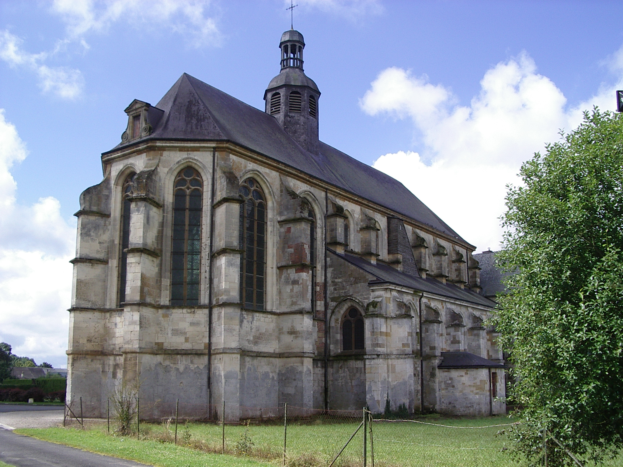 Église Sainte-Catherine Église Sainte-Catherine de Novy-Chevrières, departement des Ardennes, France.